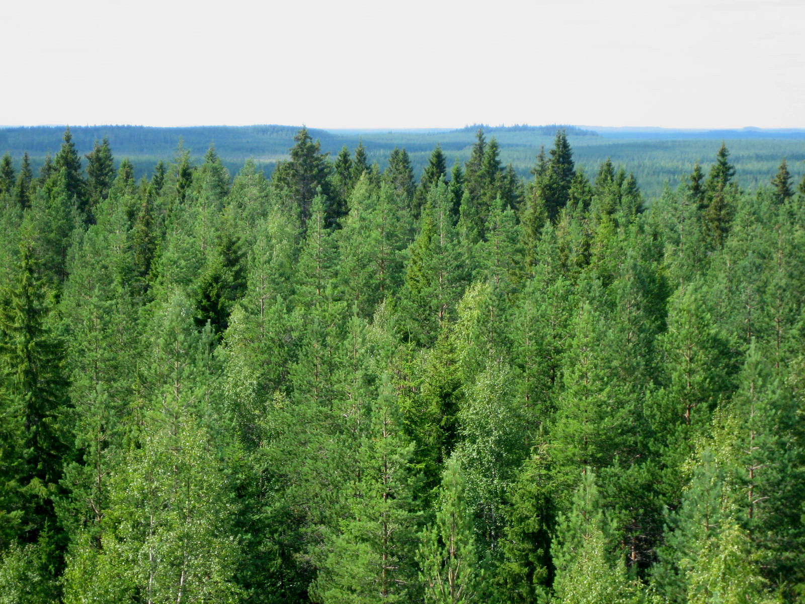 Näkymä Kiiskilänmäeltä keskisen Suomen korkeimmalta kohdalta.